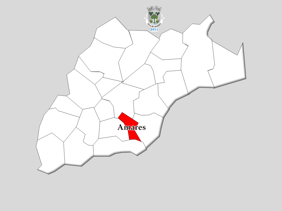 Censo 2011